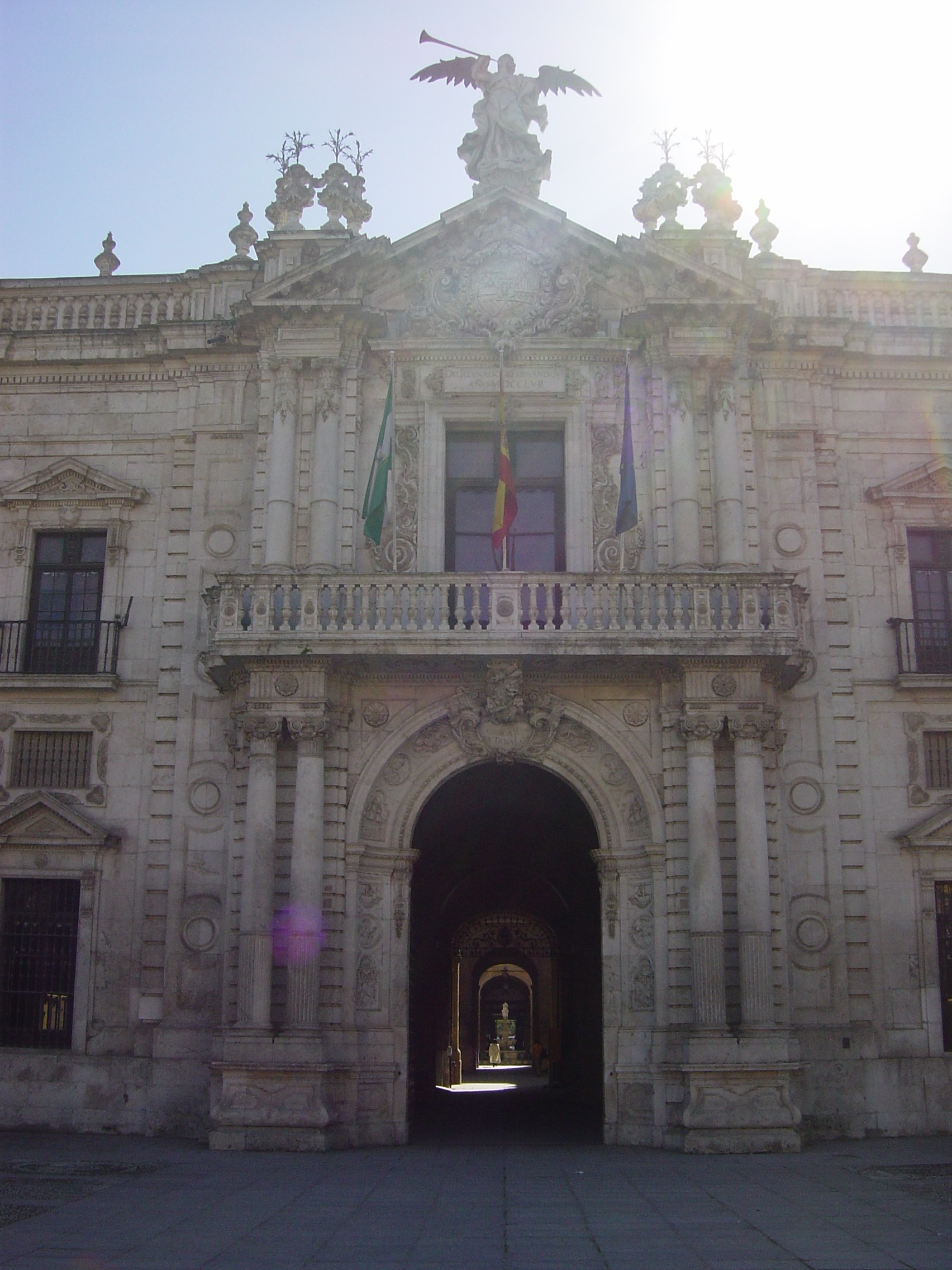 旧タバコ工場、セビーリャ、スペイン